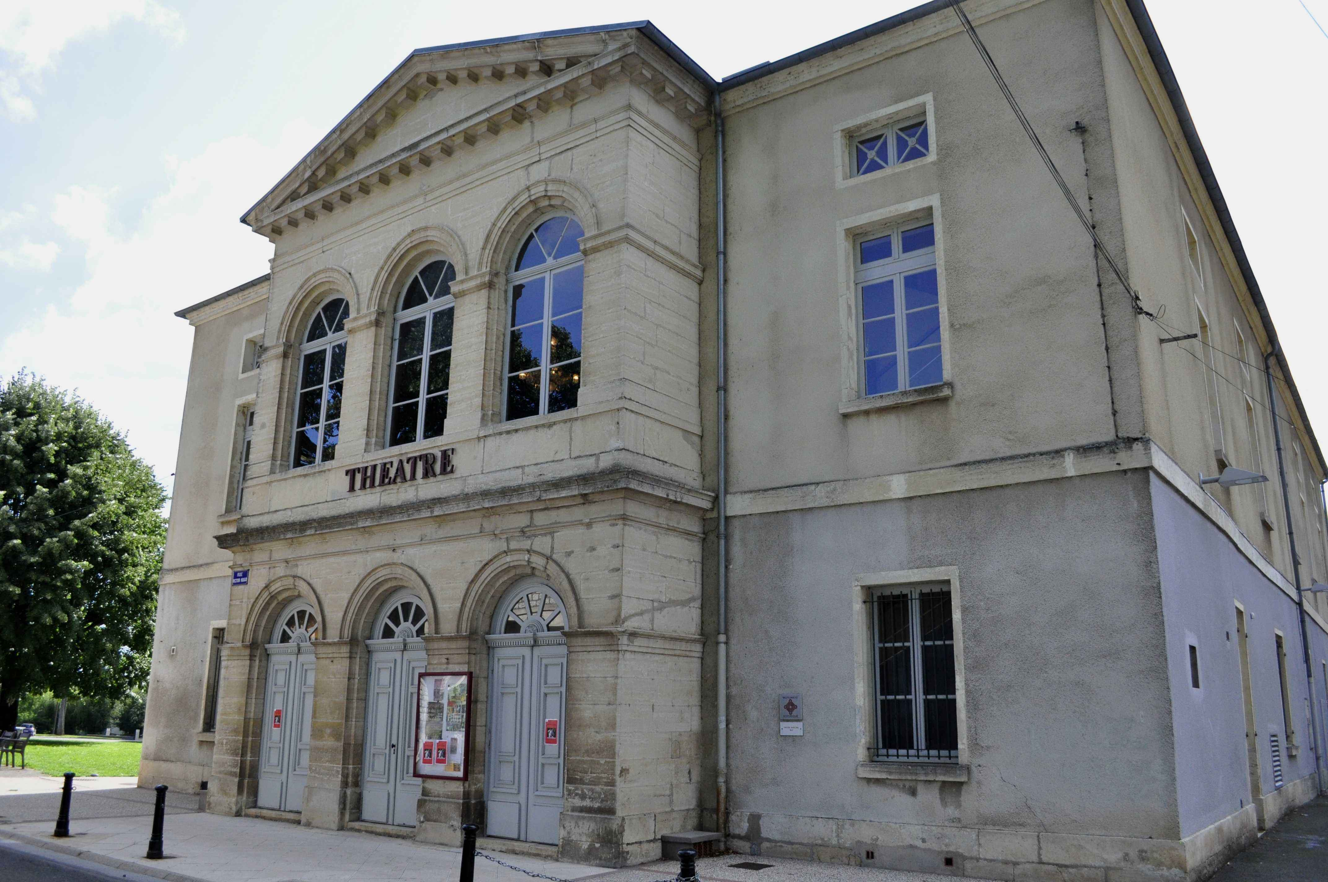 Théâtre de Gray (Haute Saône), rue Victor Hugo.